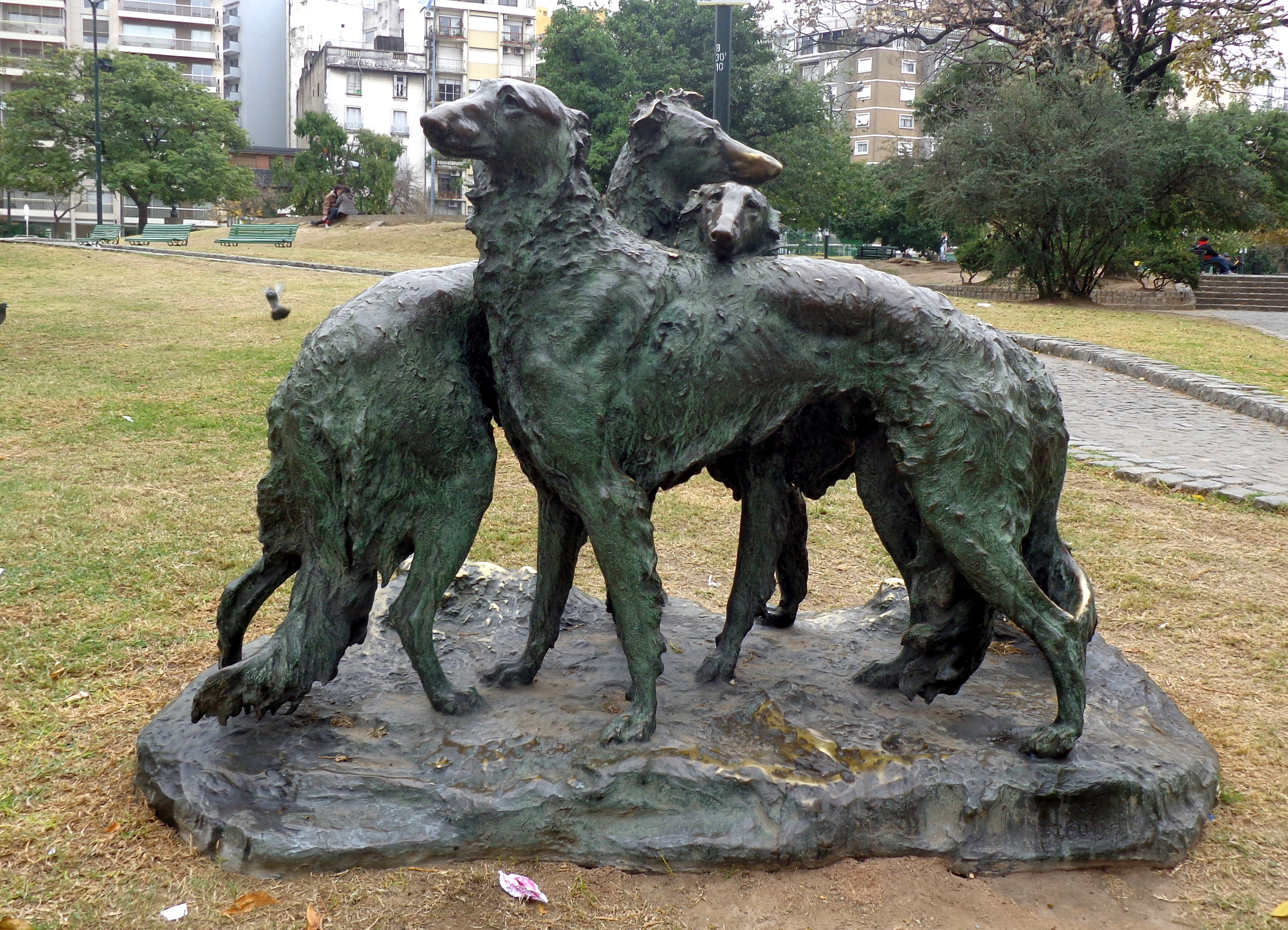 Borzois o galgos rusos en la Plaza Monseñor de Andrea, obra realizada por Giacomo J. Merculiano (1914) en avenida Córdoba y Jean Jaures, barrio de la Recoleta, en Buenos Aires, Argentina.